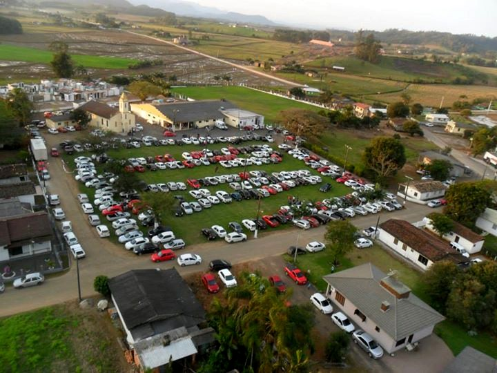 vista aérea de sanga grande